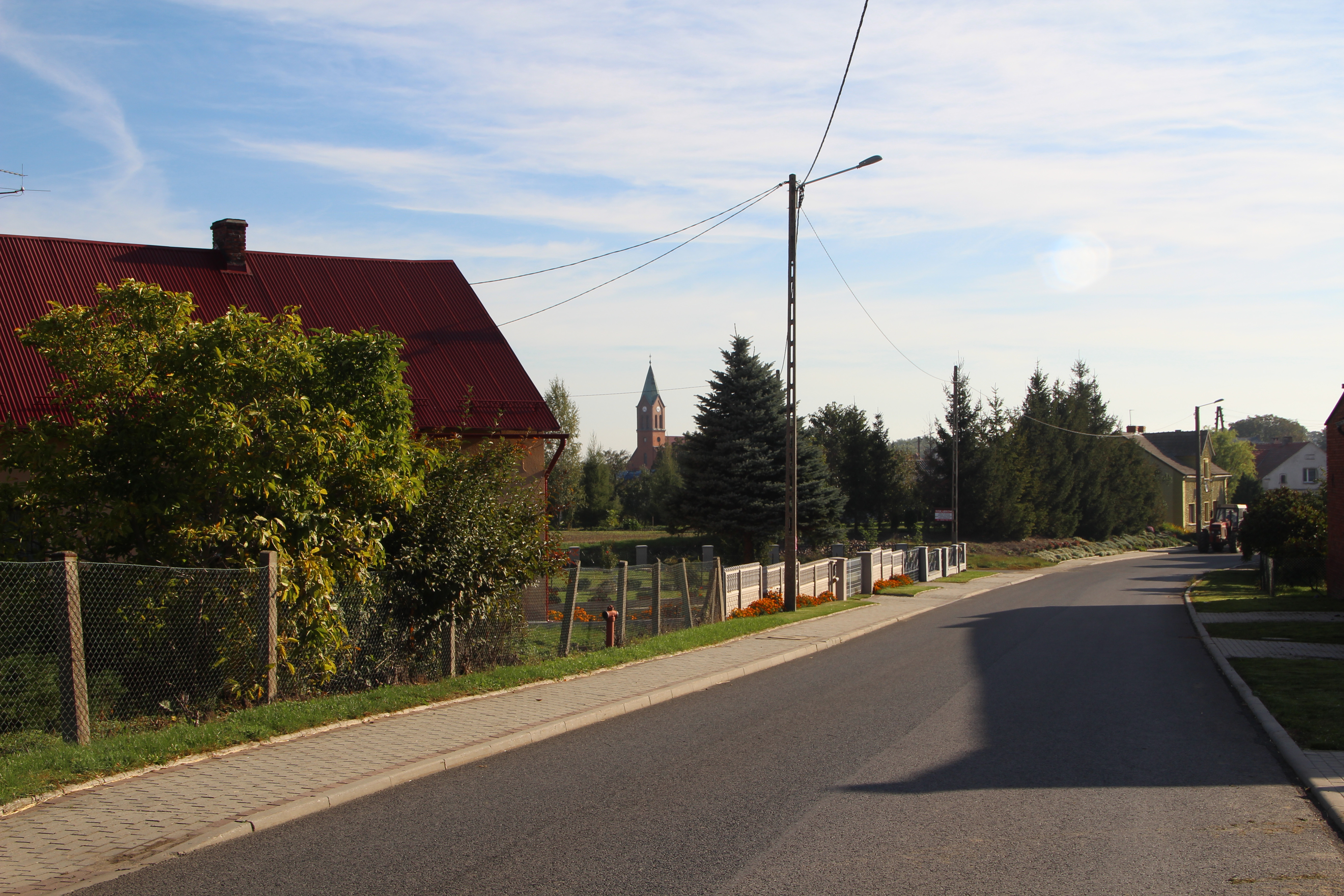 Ostrożnica (w j. niem. Ostrosnitz) – wieś w Polsce położona w województwie opolskim, w powiecie kędzierzyńsko-kozielskim, w gminie Pawłowiczki.